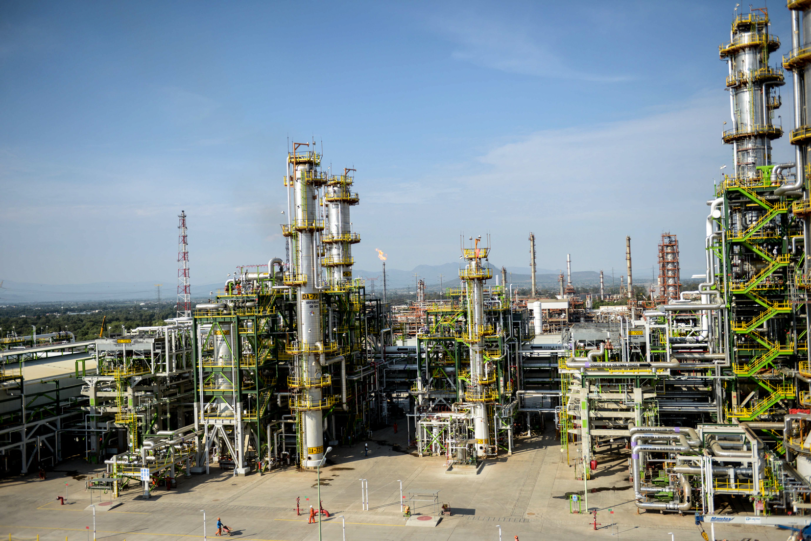 Tula Refinery in Hidalgo, Mexico.